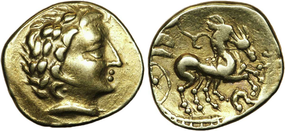 Statère d’or à la tête de face frappé par les Carnutes Date : Ier siècle avant J.-C.